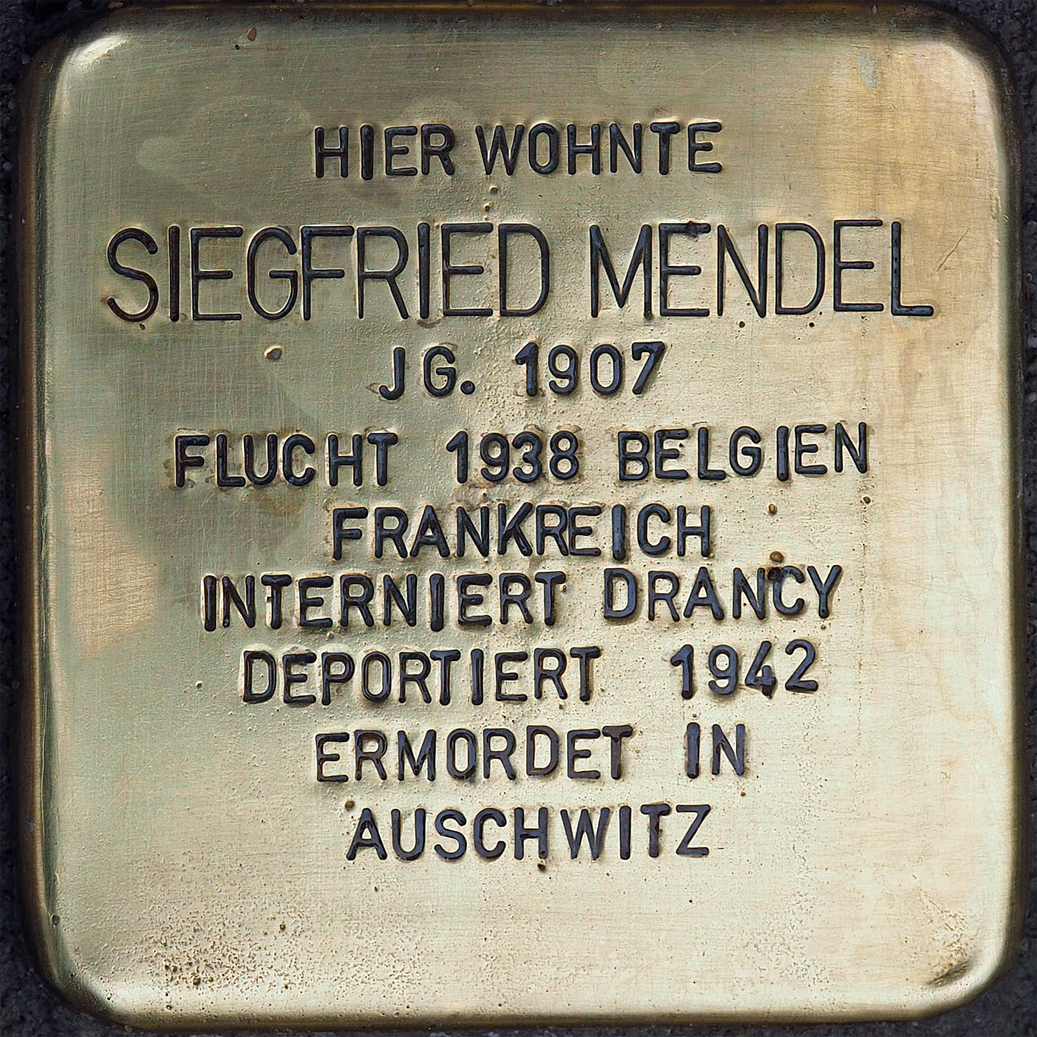 Stolpersteine in Kempen: Mendel, Siegfried